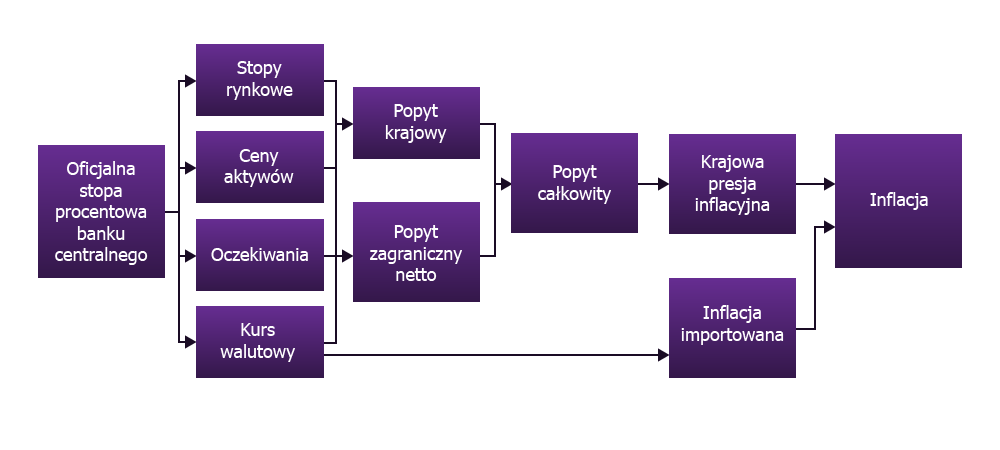 Mechanizm transmisyjny polityki pieniężnej